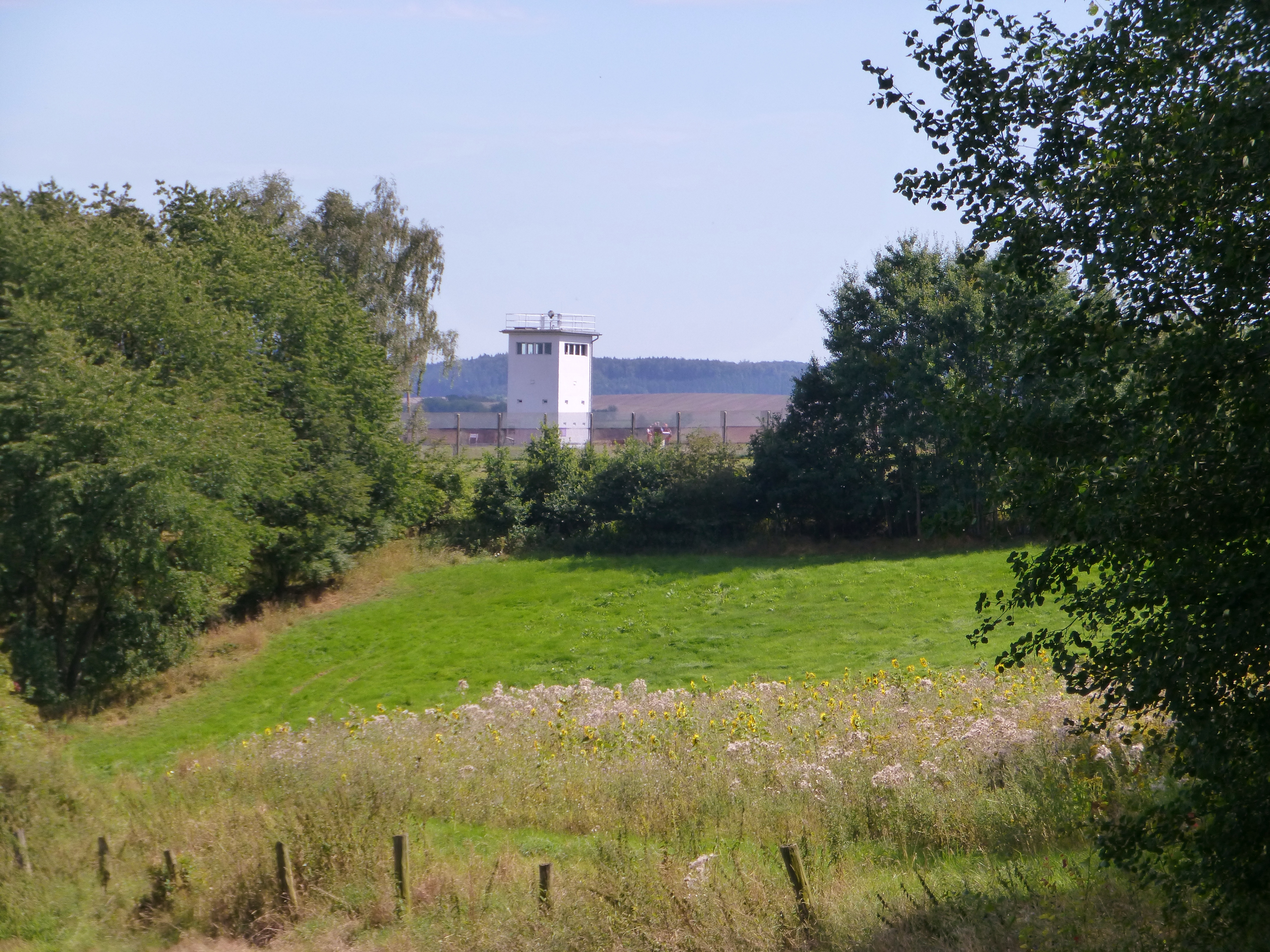 Blick zur ehemaligen Führungsstelle Pferdeberg